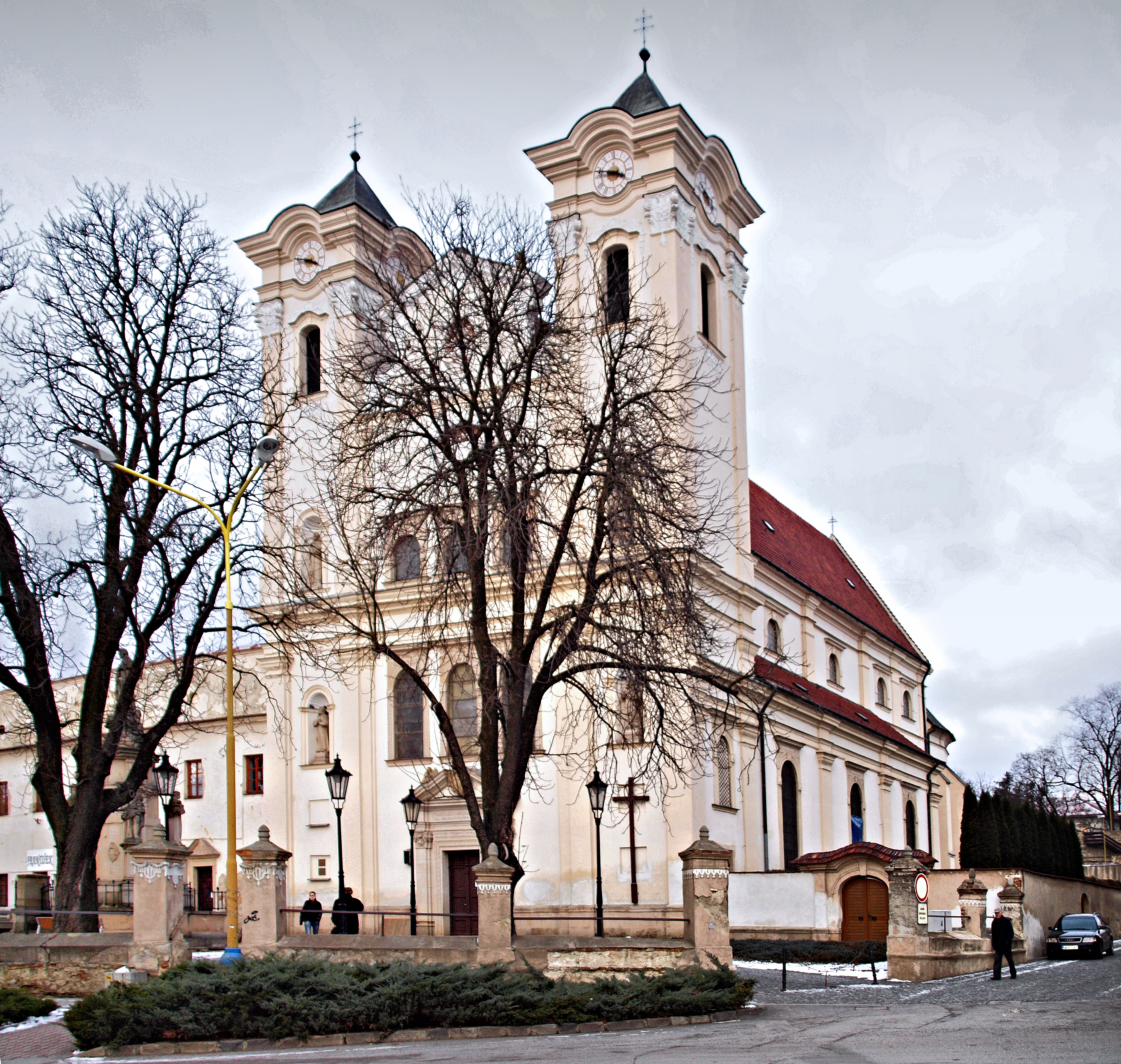 Prešov - Kostol sv. Jozefa (église franciscaine Saint-Joseph)